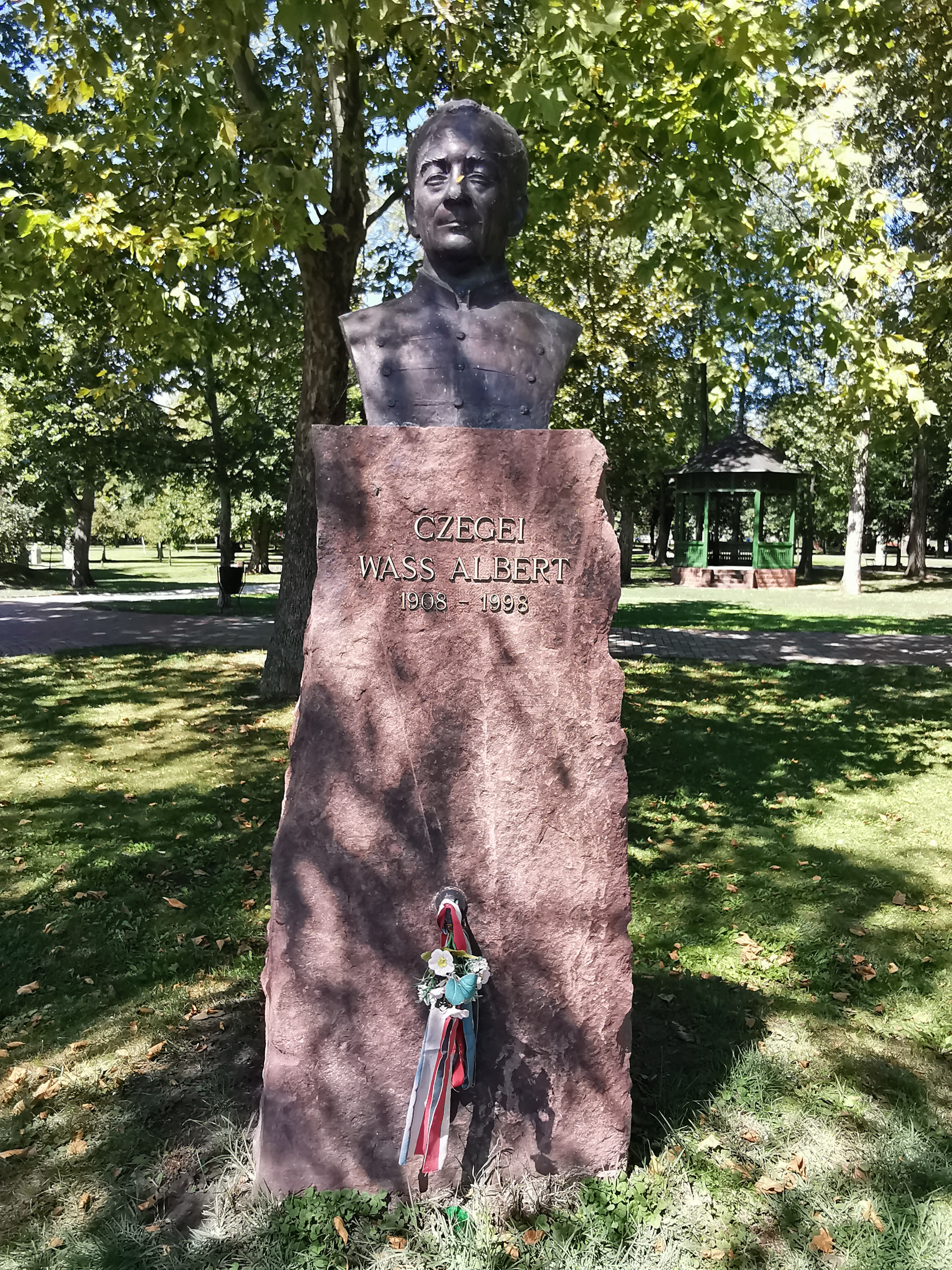 Wass Albert szobra Balatonalmádiban